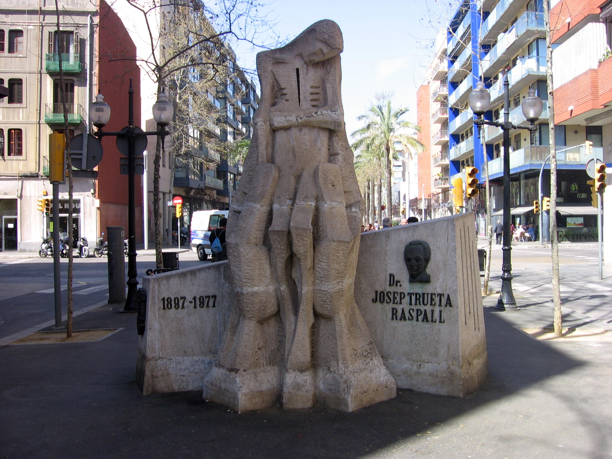 Monumento al Doctor Trueta (1978), de Josep Ricart, Rambla del Poblenou.